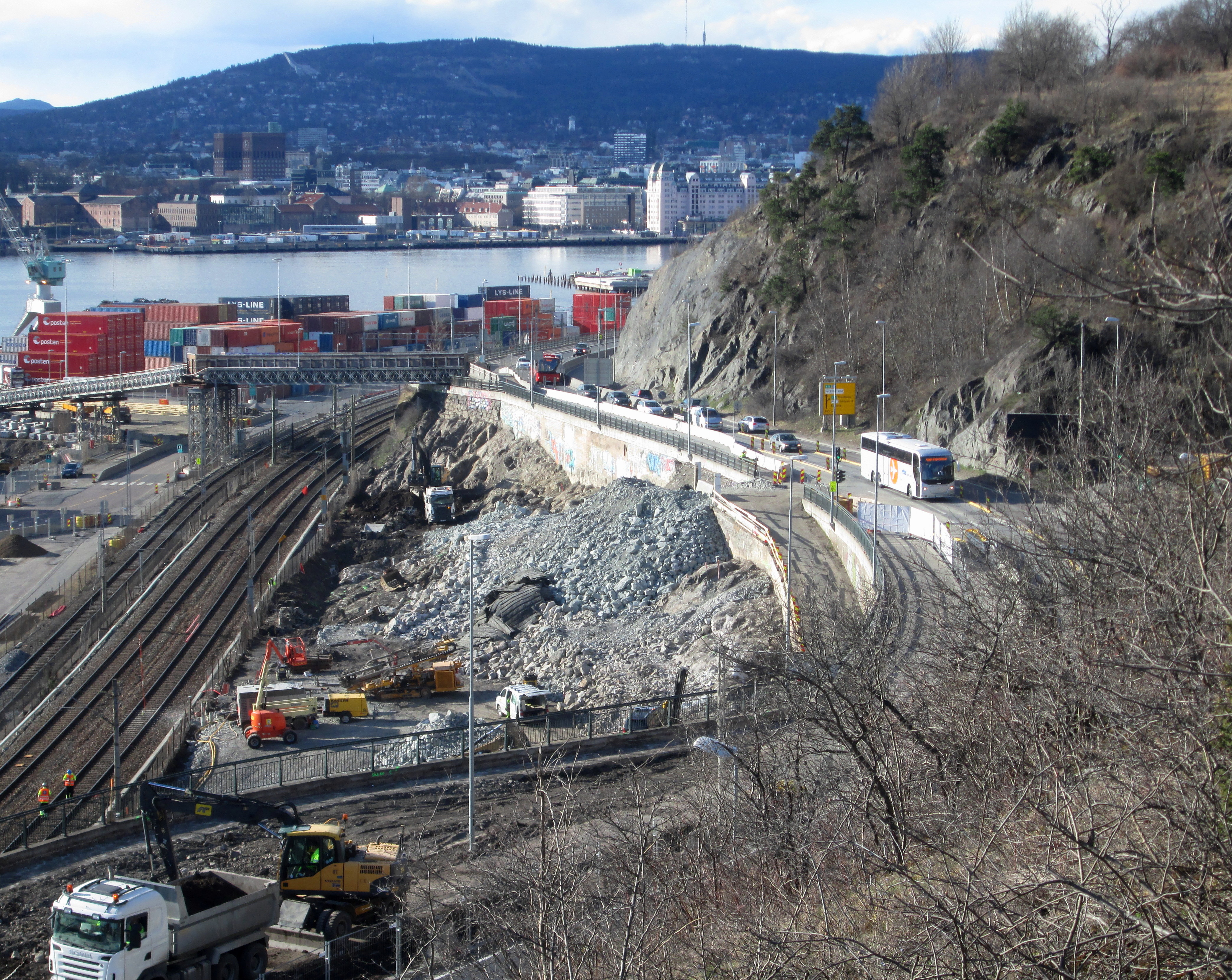 Den gamle bebyggelsen i Kongshavn er revet, og arbeid med nytt toplanskryss er i gang 2013.